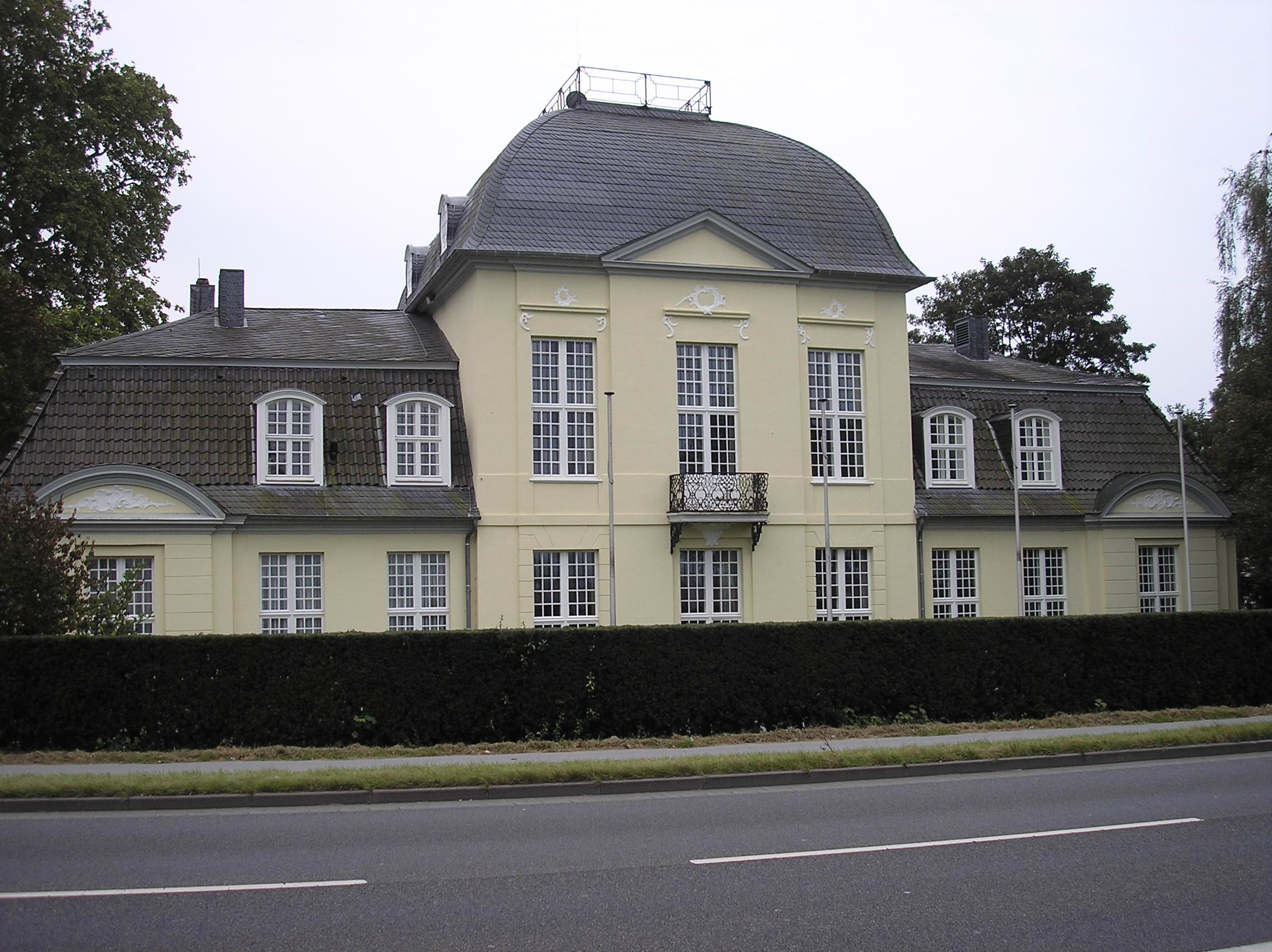 Haus Schmithausen in Kleve-Kellen. Sitz der Euregio Rhein-Waal